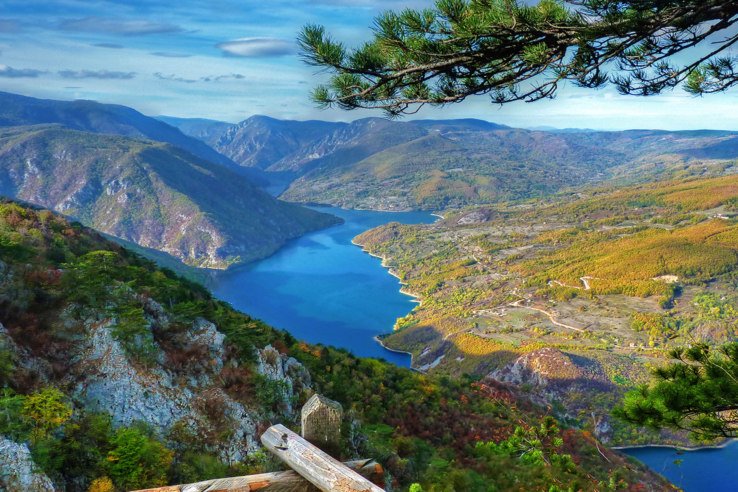 Čaroban pogled sa Banjske stene Ово је фотографија заштићеног природног добра у Србији под шифром: НП03 This is a a photo of a natural area in Serbia with ID: НП03